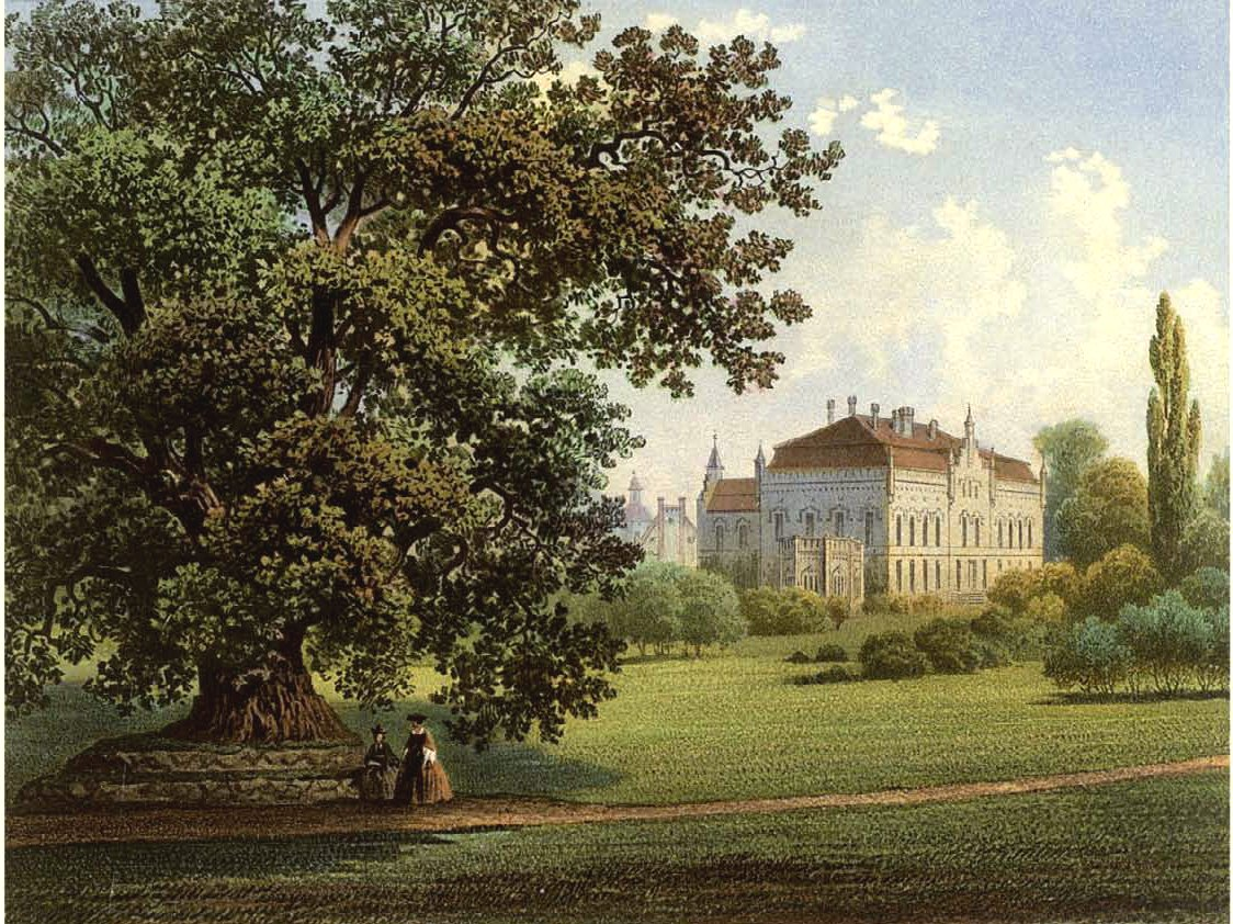 Schloss Nennhausen, Kreis Westhavelland, Provinz Brandenburg, Lithografie aus dem 19. Jahrhundert